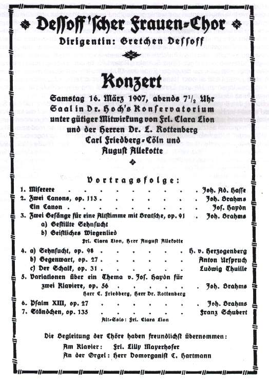 Poster